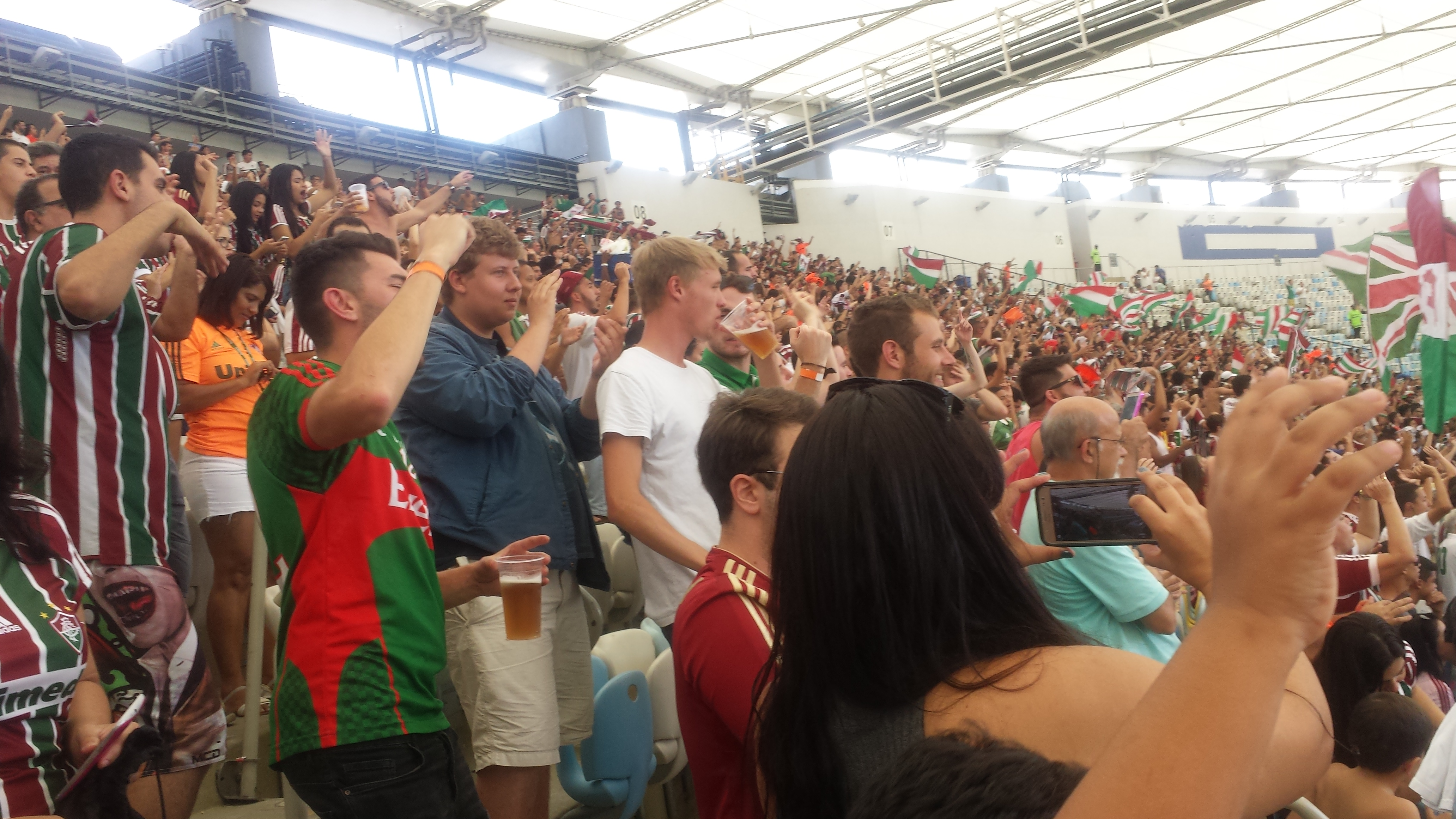 Torcida do Fluminense contra o Santos em 14 05 2017, em partida válida pelo Campeonato Brasileiro de Futebol.